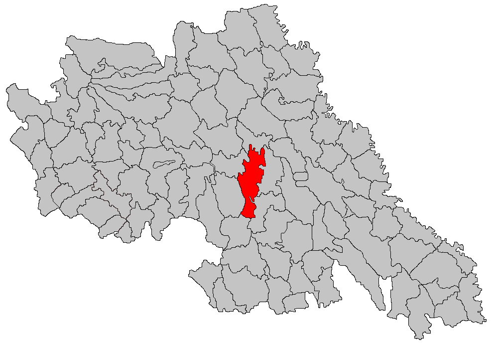 Categorie:Hărţi ale judeţului Iaşi